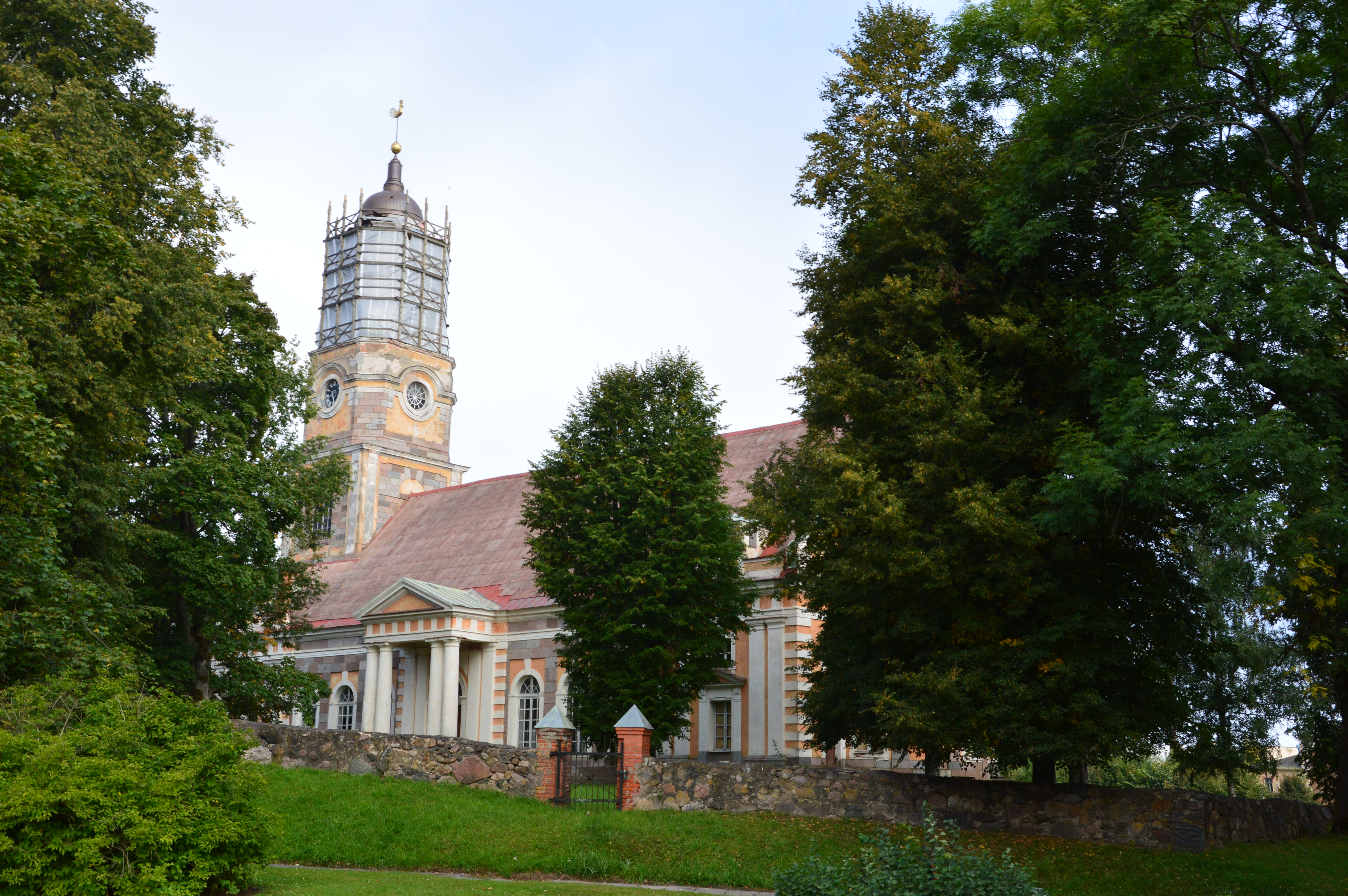 Aluliina (Alūksne) luteri kirik